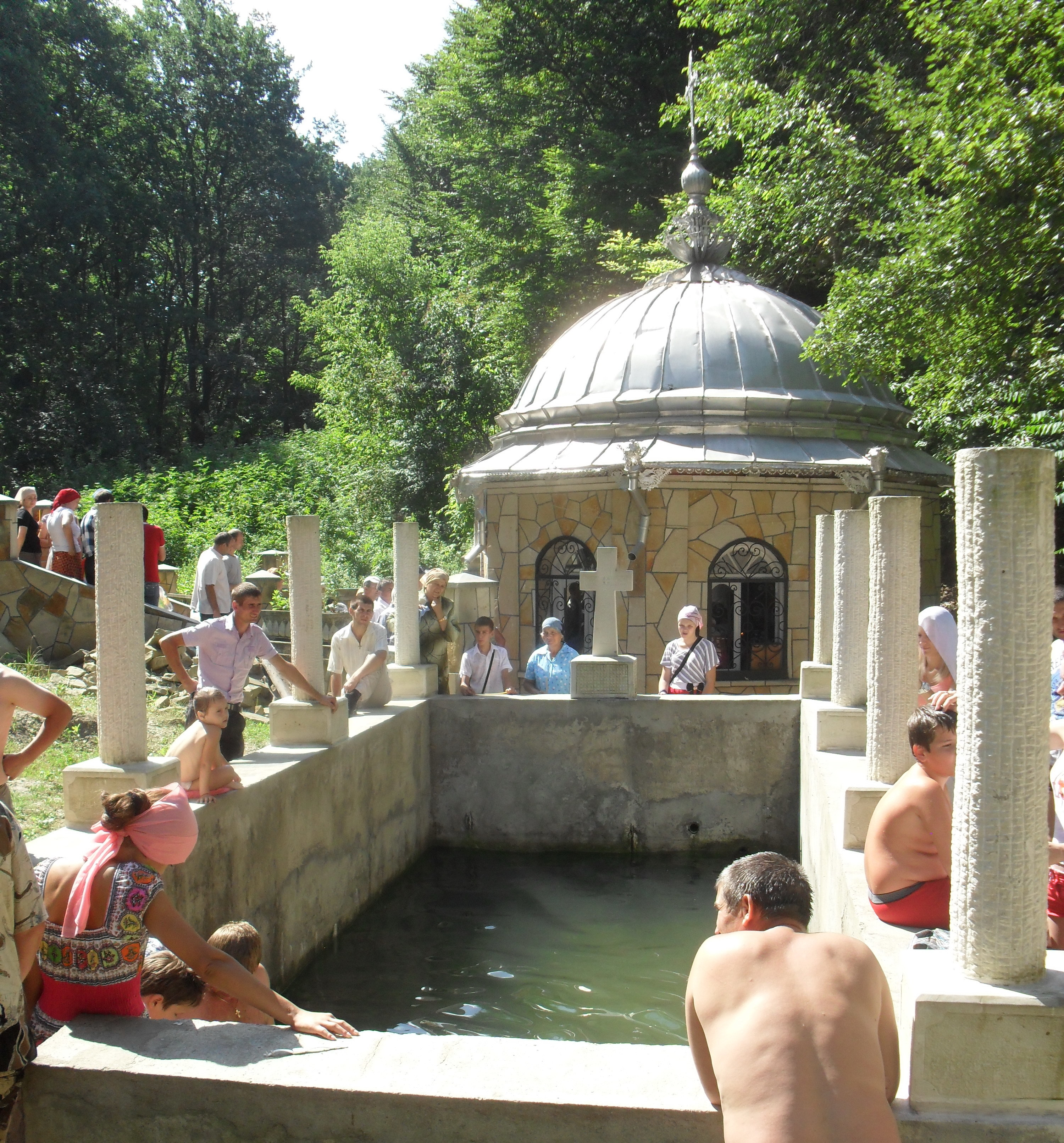 Косеуцький монастир. Купальня